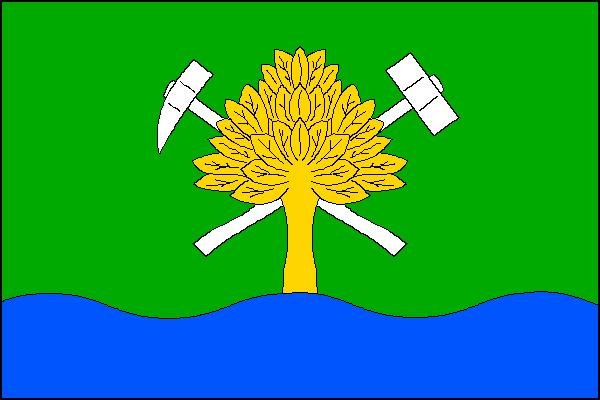 Vlajka obce Stará Ves (okres Bruntál)